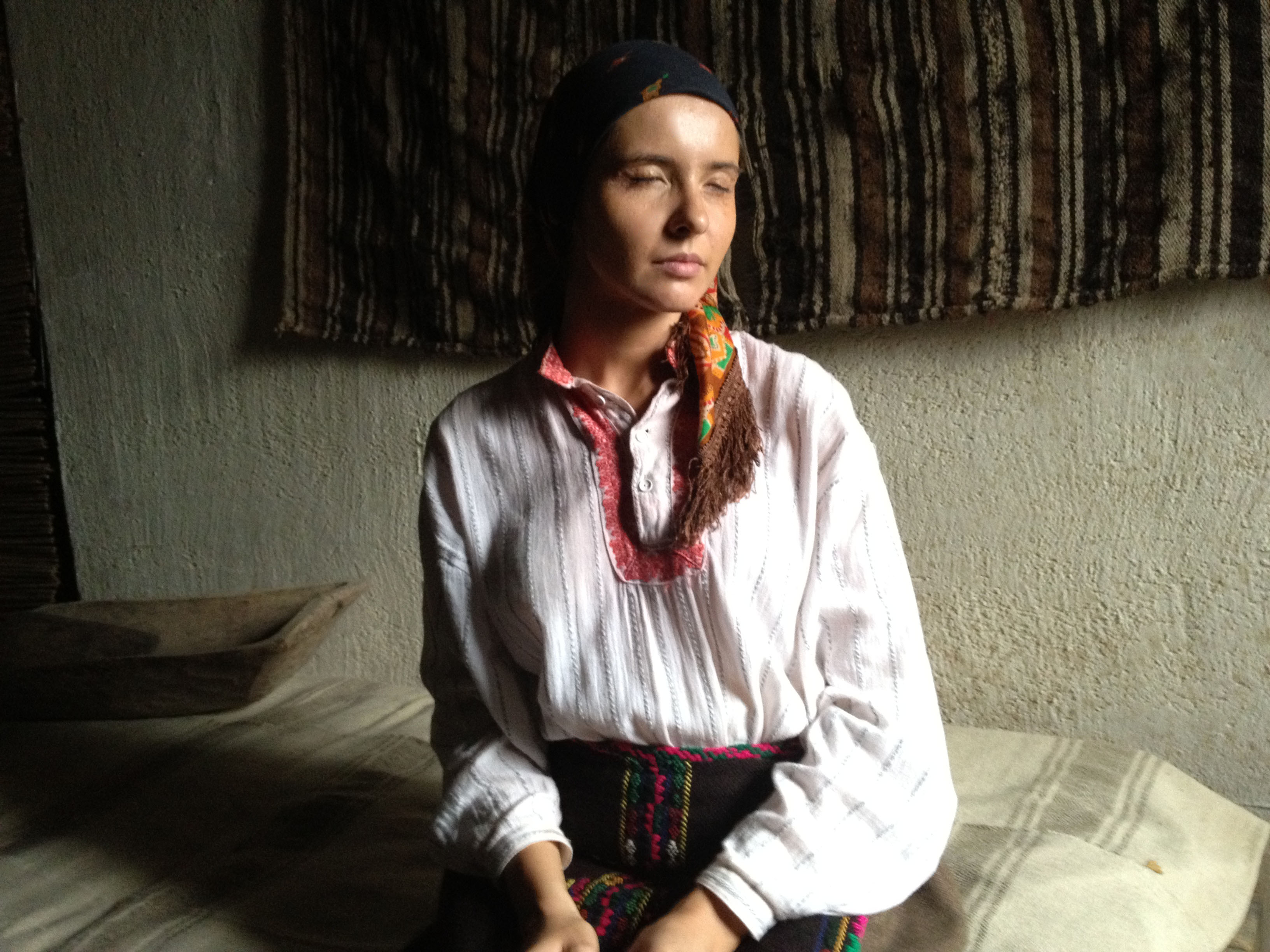 Наталья в роли Ванги